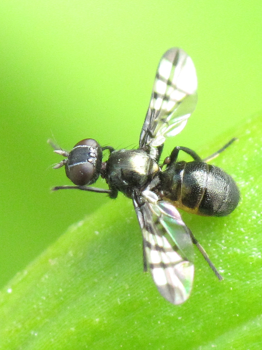 Mosca en Bastavales, Brión, Galiza.Herina sp.